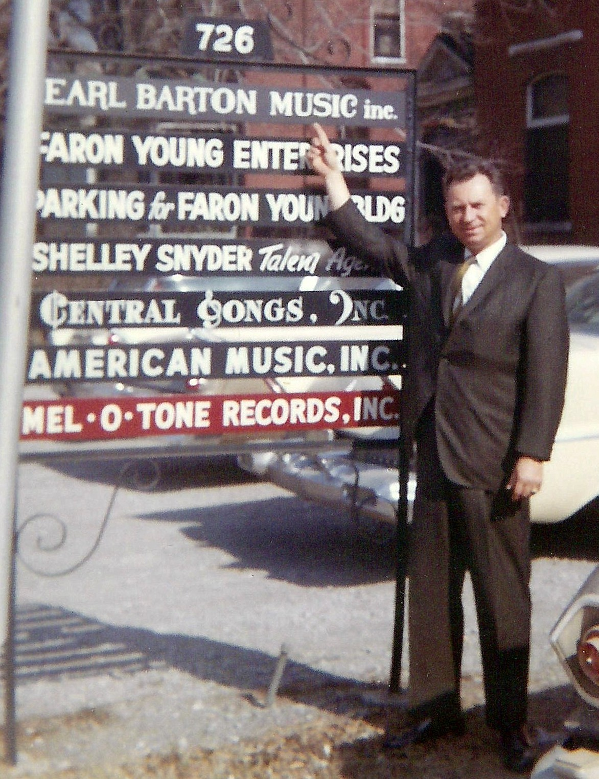 Si Siman